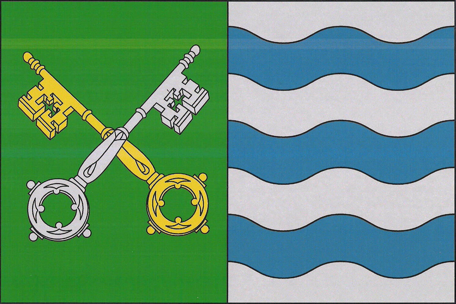 Bandera de San Pedro del Arroyo